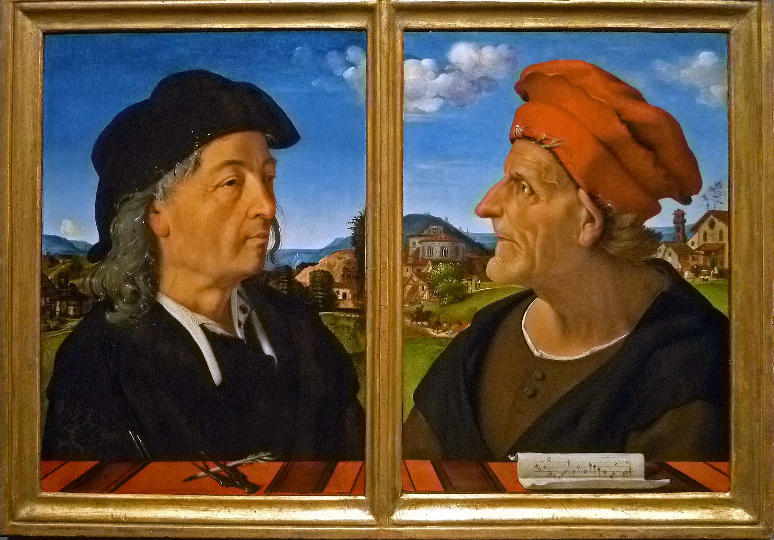 diptych